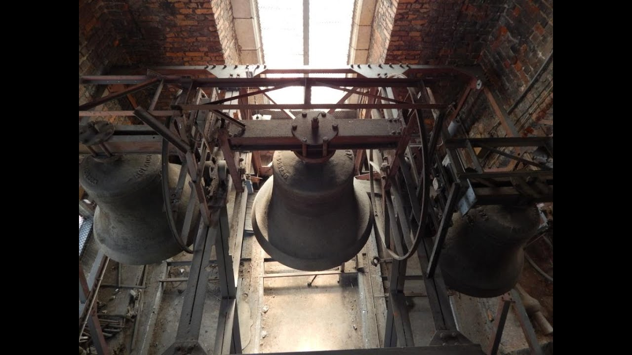 Dzwony Katedra Wrocław